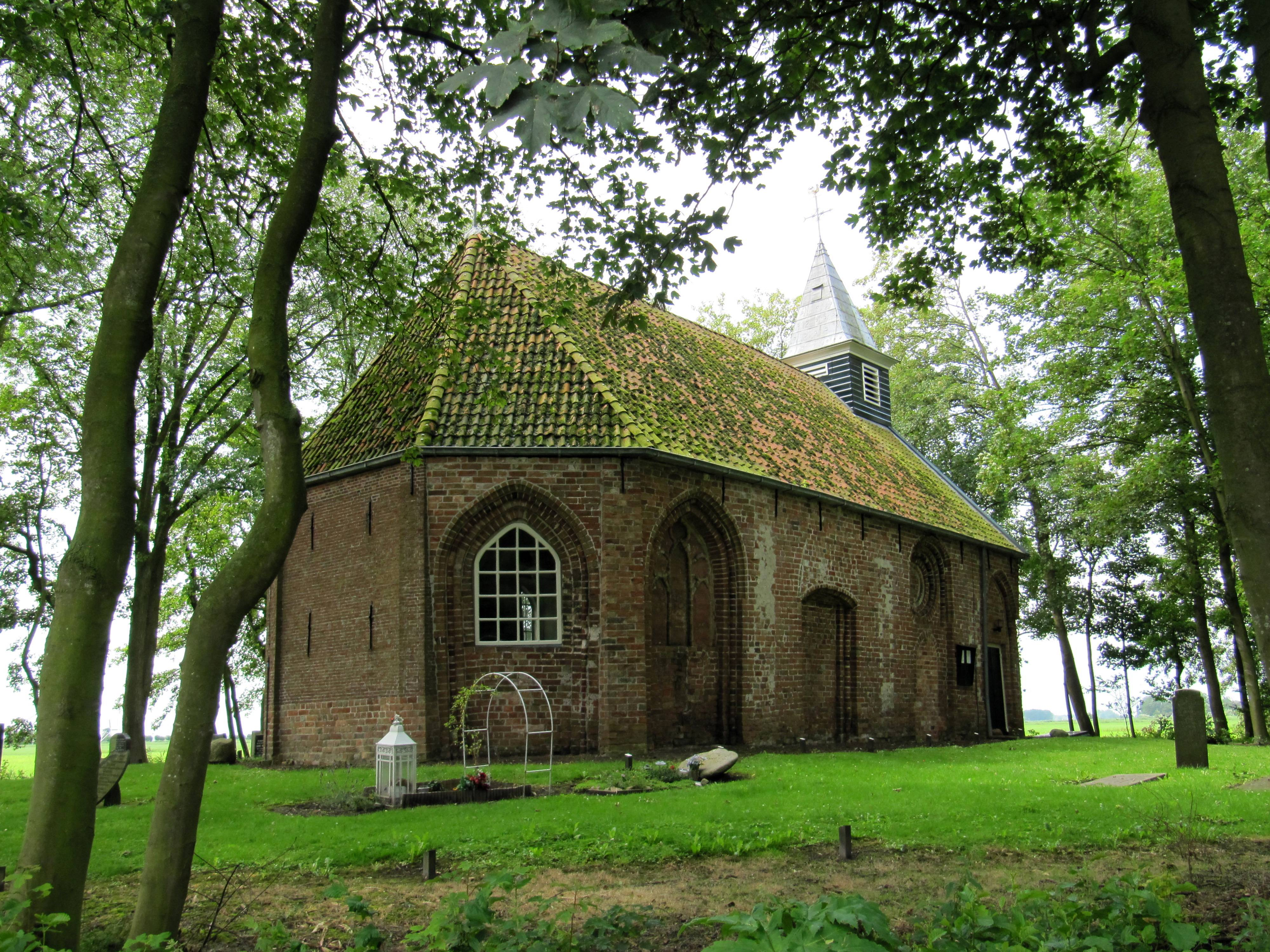 Herv. Kerk. Oorspronkelijk tot de abdij Klaarkamp behorend vroeggotisch bakstenen kerkje, in het dorpje Sijbrandahuis/Sibrandahûs, in de gemeente Dantumadeel/Dantumadiel. (dat is dus in en andere gemeente dan Dokkum dat de hoofdplaats is van Dongeradeel.)